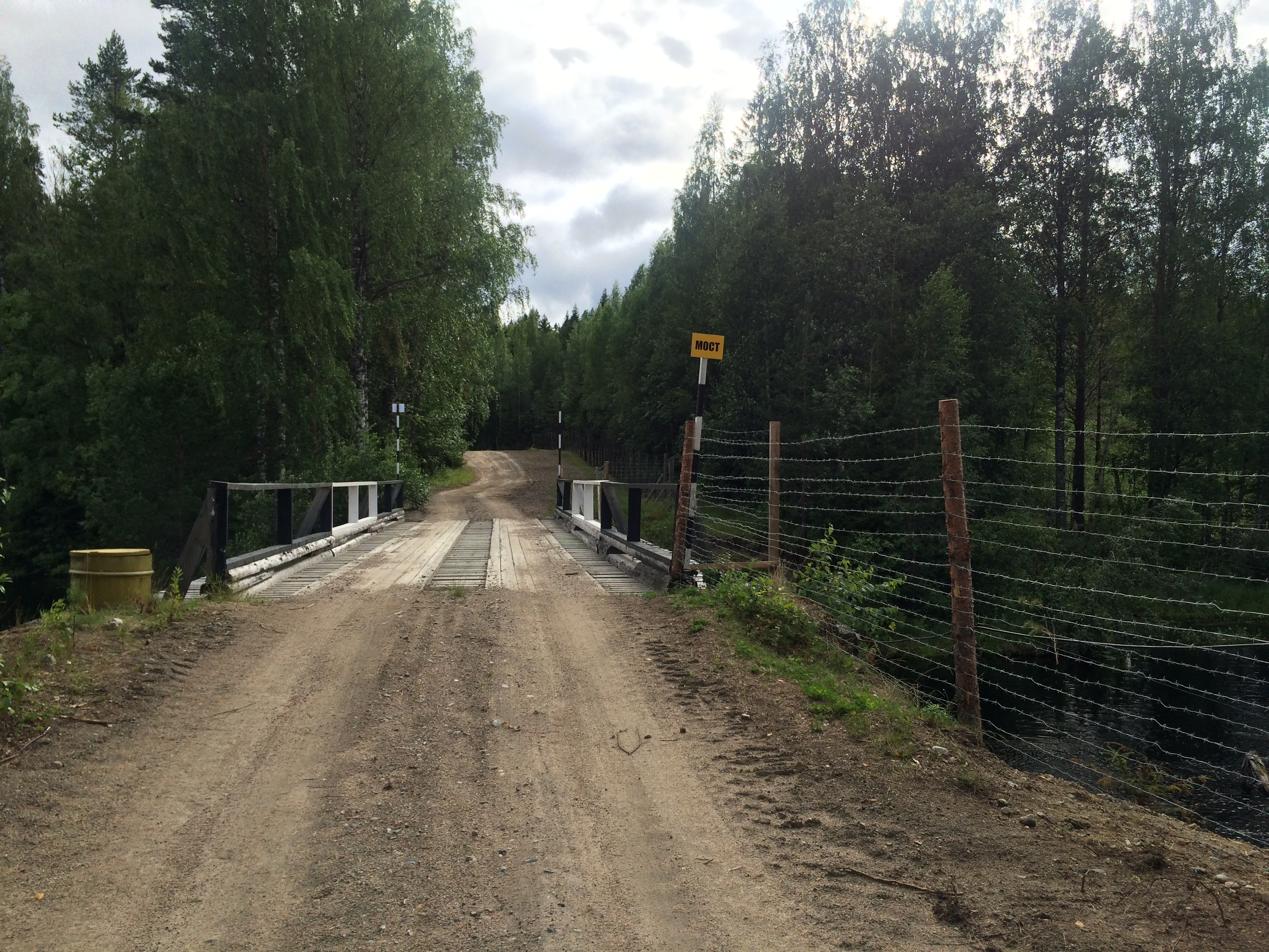 Сютивиермянйоки